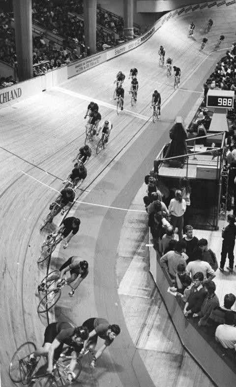 Berlin, Bahnradrennen, Übersicht ADN-ZB Oberst 9.1.88 Berlin: Hallenradrennen - Zur 1001 runde um den Großen preis des Neuen Deutschland starteten die Teilhnehmer in der Werner-Seelenbinder-Halle.